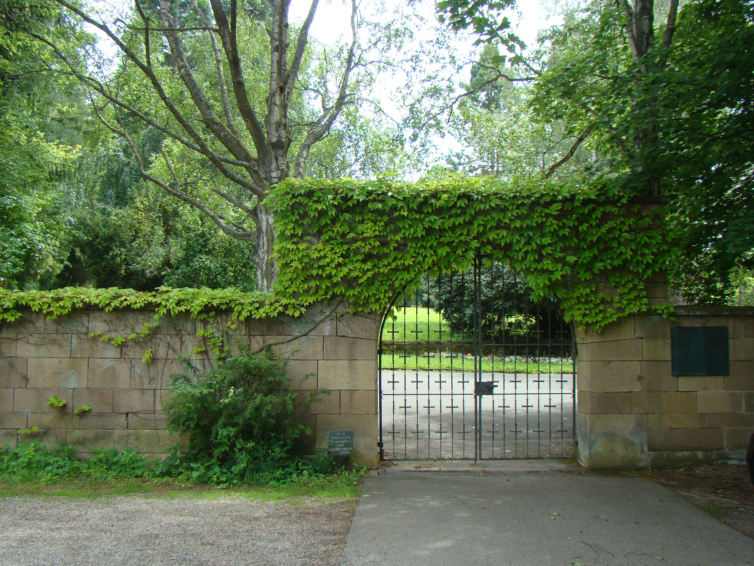 Portal des Ehrenfriedhofs in Heilbronn